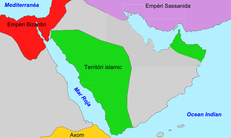 Peninsula Aràbia e regions vesinas en 632.